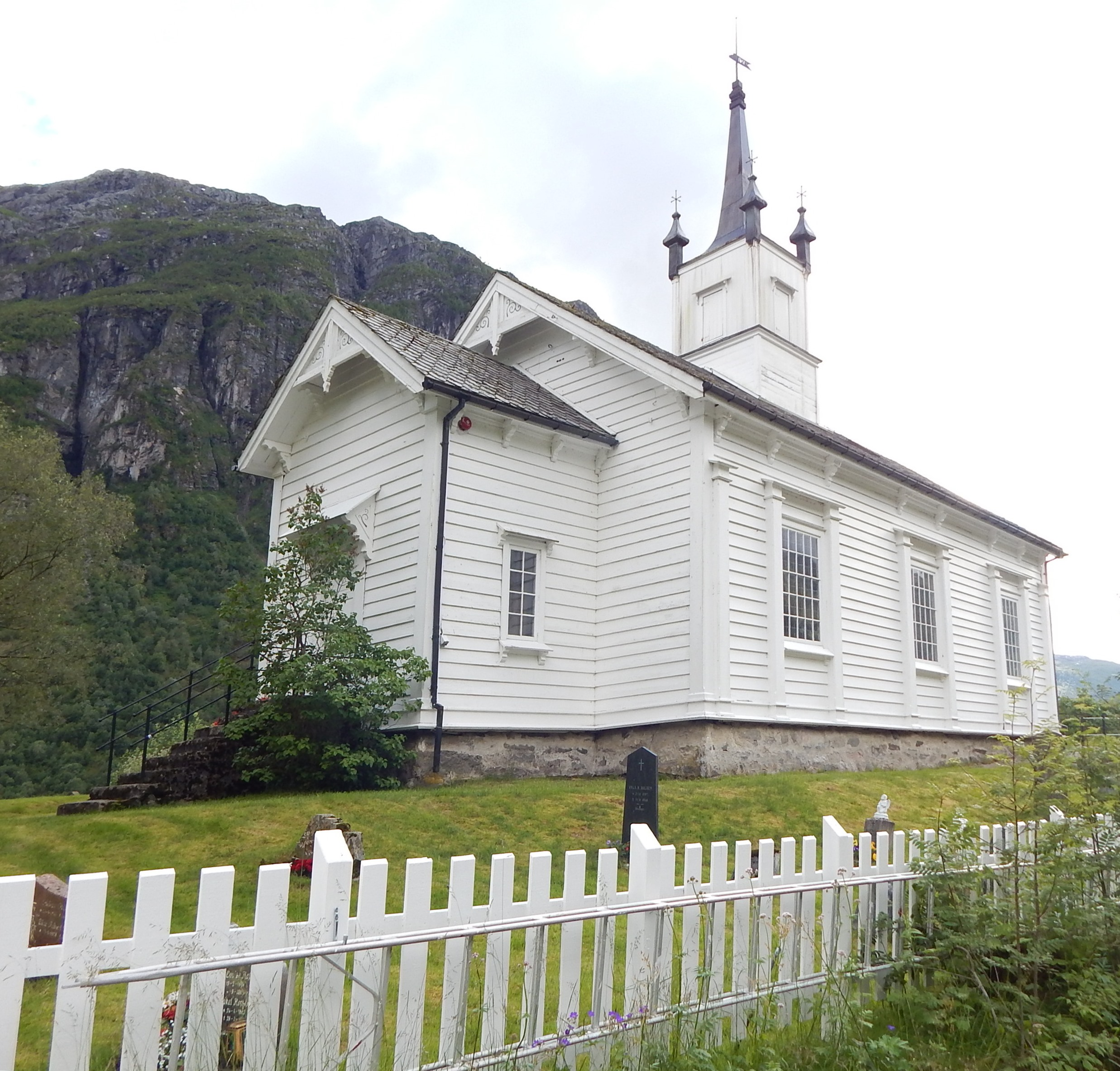 Holsen kirke